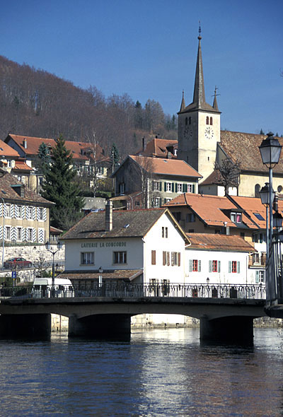 Vallorbe: Dorfzentrum mit Brücke über die Orbe